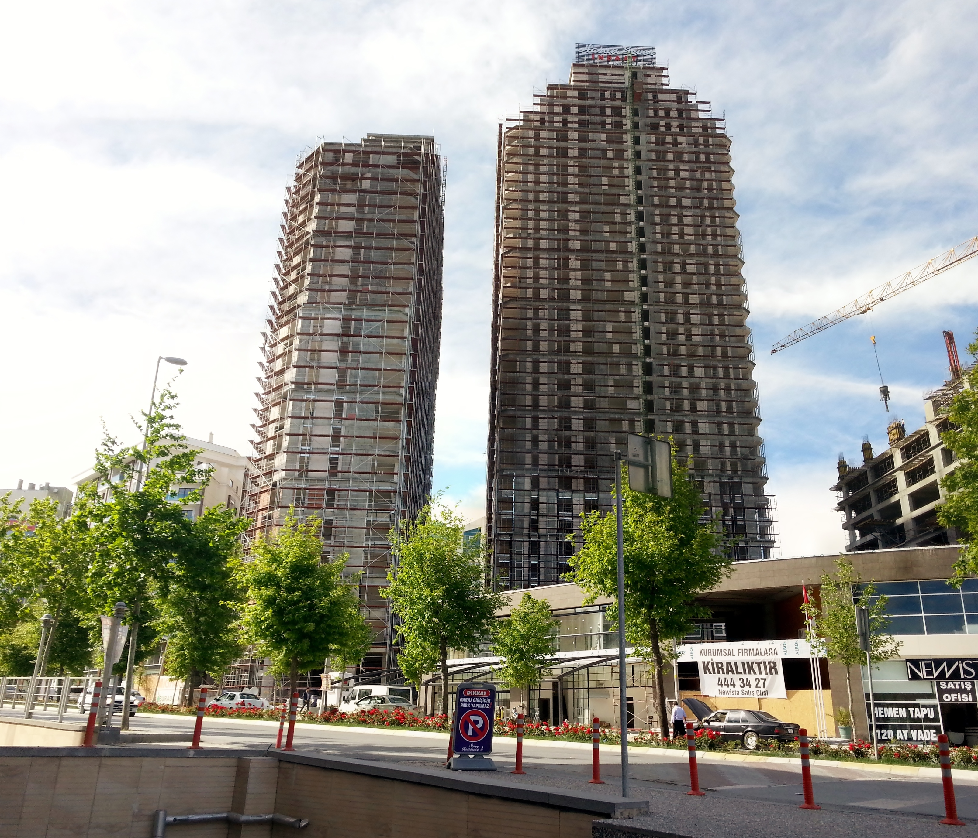 Newista Residence İnşaatı Esenyurt-Beylikdüzü Bölgesi, Mayıs 2014